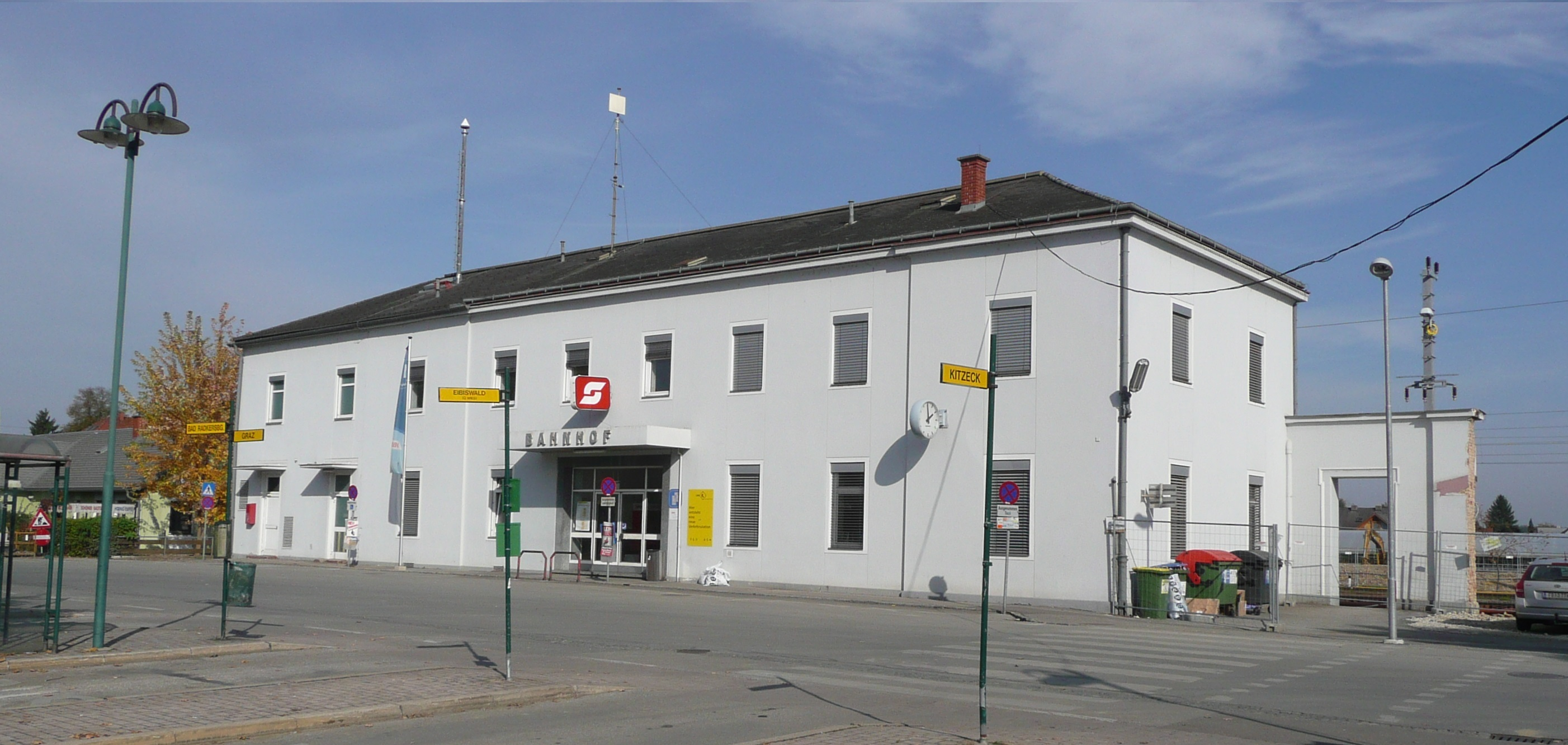 Bahnhof Leibnitz, Westseite